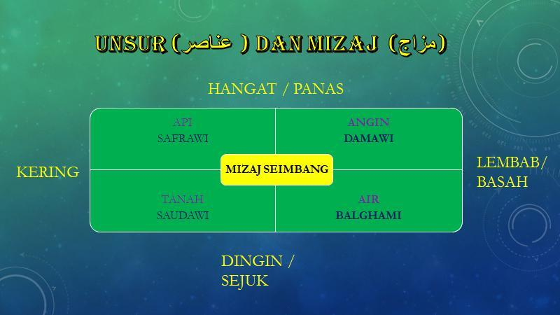 carta unsur dan mizaj